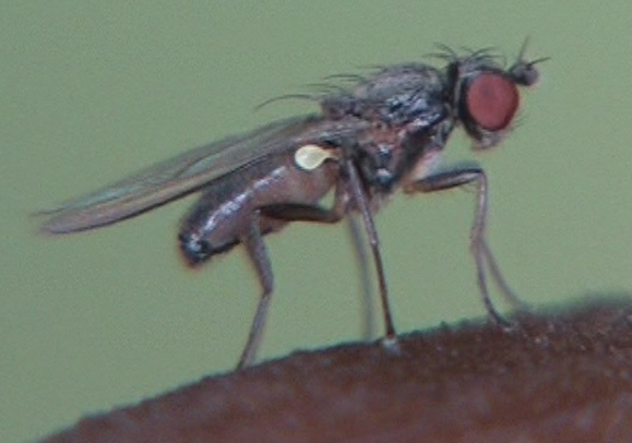 Acartophthalmus nigrinus. Single frame from File:Acartophthalmus nigrinus - 2013-10-07.webm